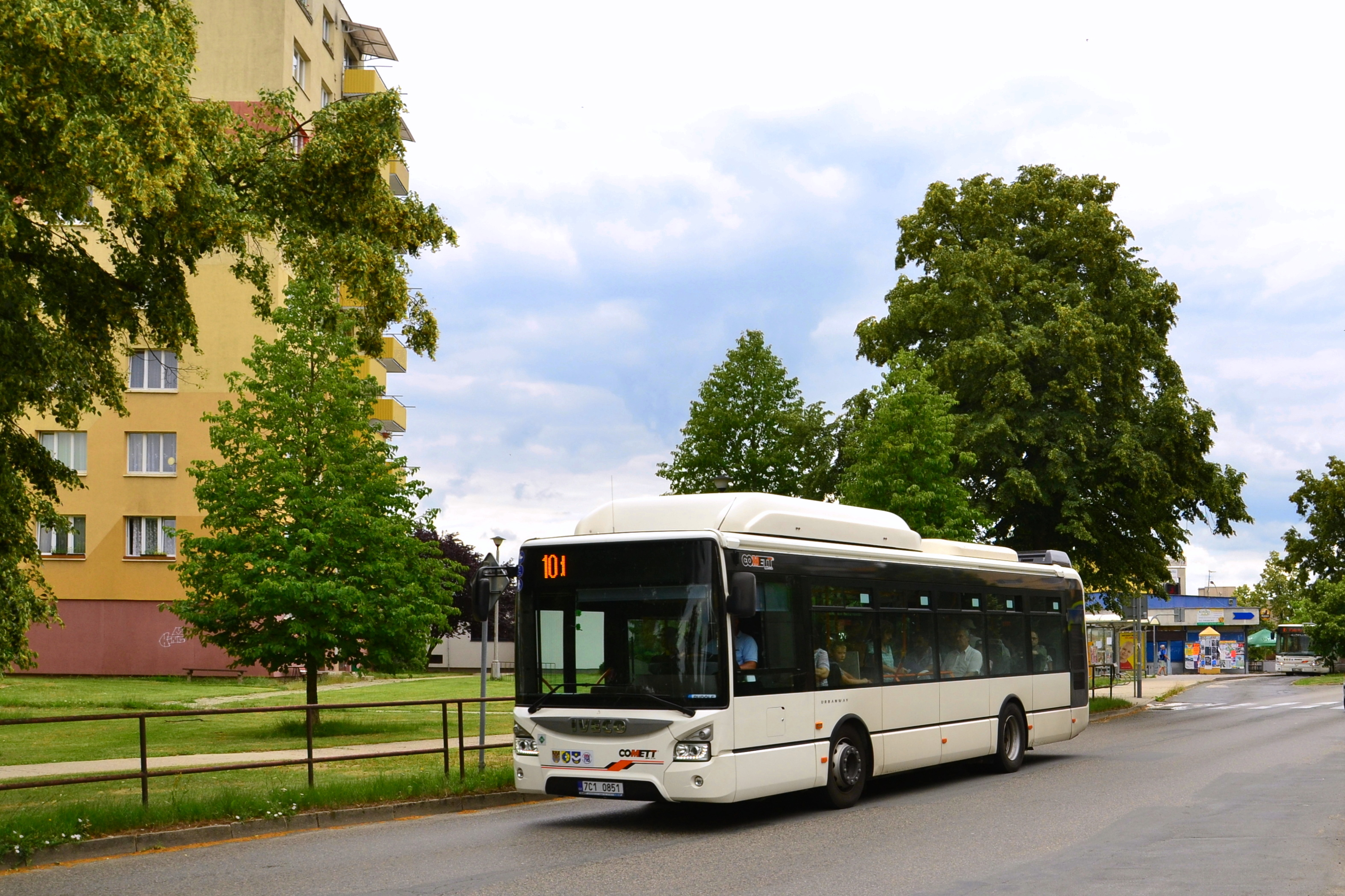 Standardní krátké vozy jsou nasazovány také na linku 10